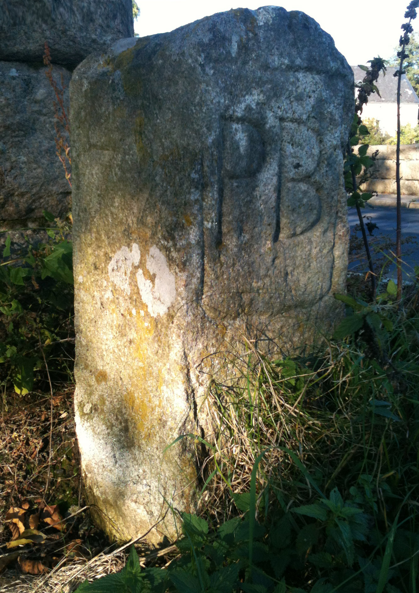 Grenzstein an der Feisnitzbachbrücke in Heiligenfurth. Wohl aus dem 18. JahrhundertThis is a photograph of an architectural monument.